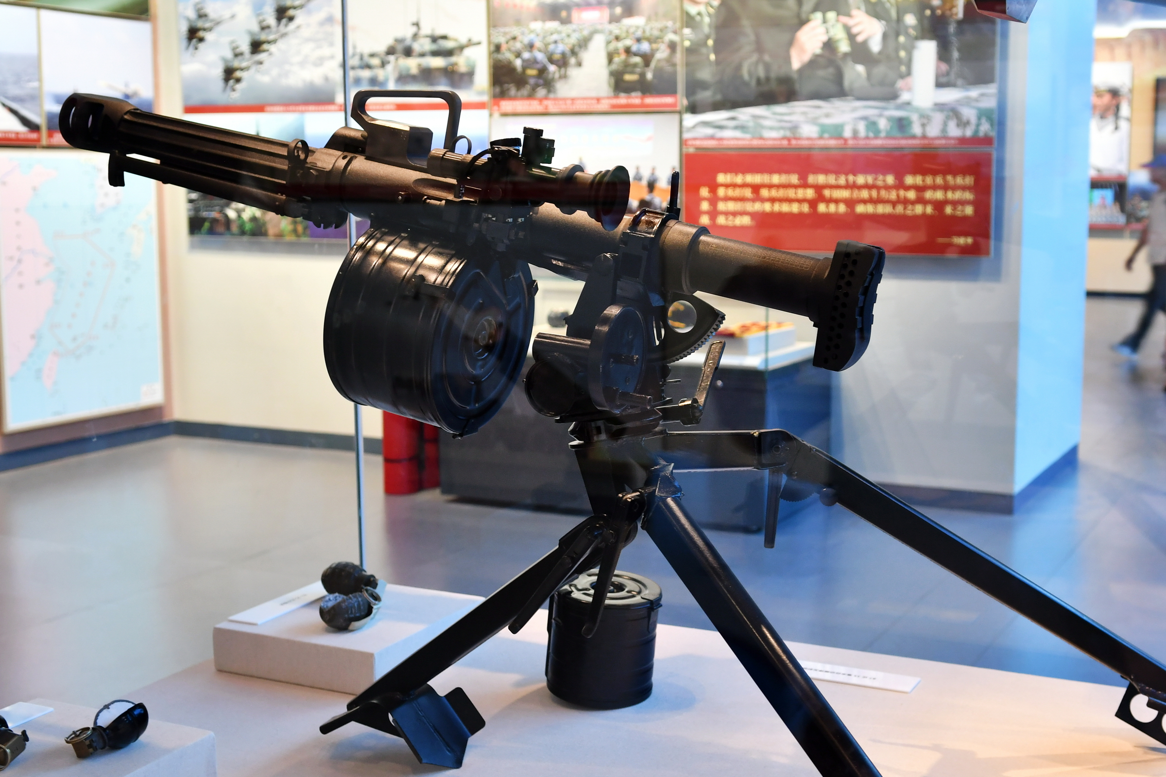 87式35毫米自动榴弹发射器